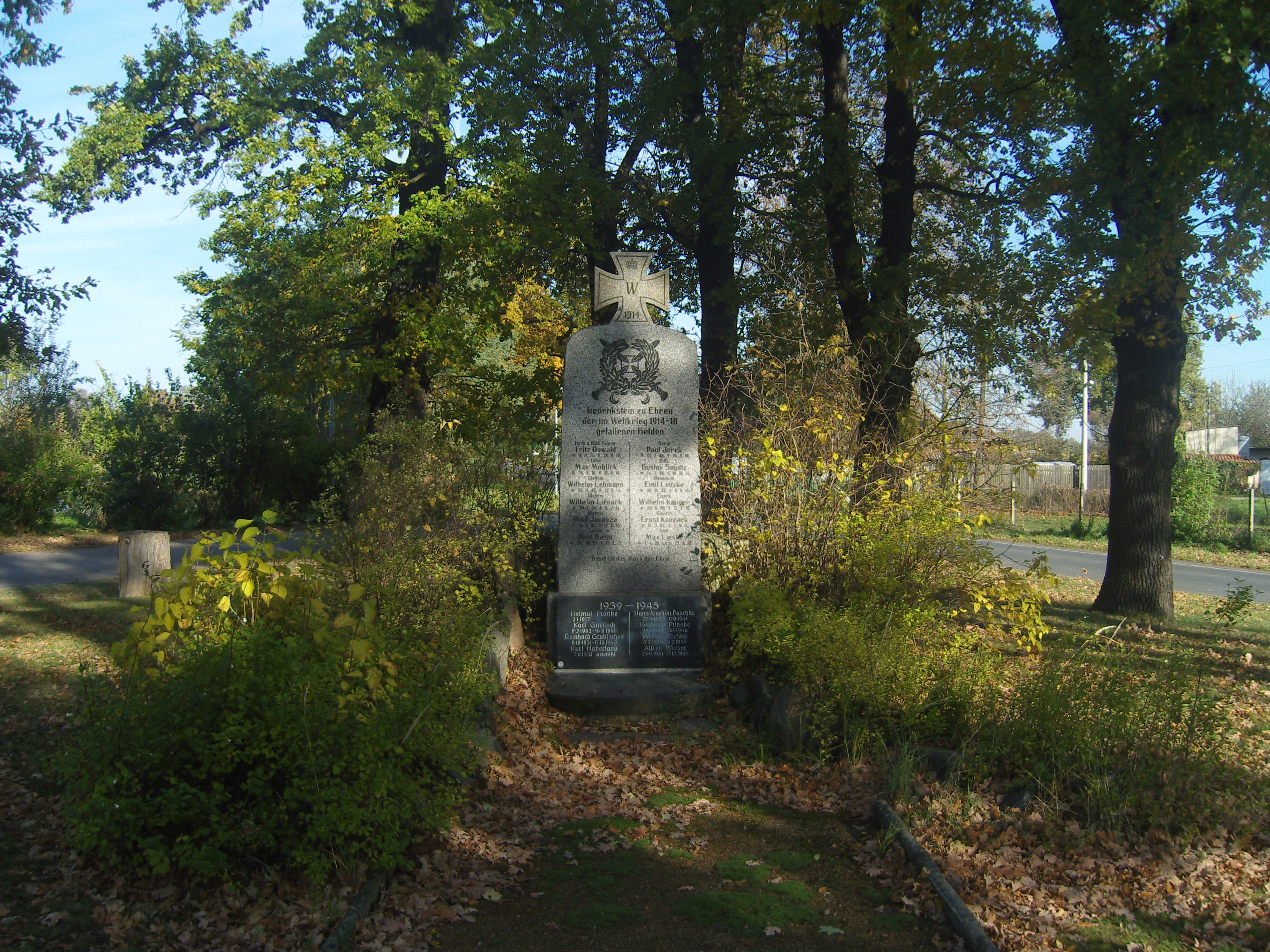 Kriegerdenkmal für die Gefallenen des Ersten Weltkriegs in Schöllnitz, Gemeinde Luckaitztal